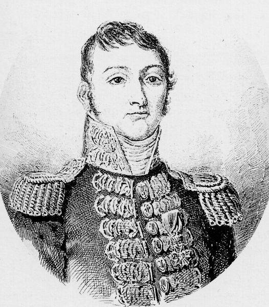 Portrait of Pierre Bouvet de Maisonneuve